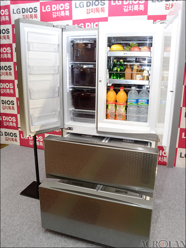 2012년 9월 21일, 서울 플라자 호텔에서 개최된 LG DIOS 김치톡톡쇼